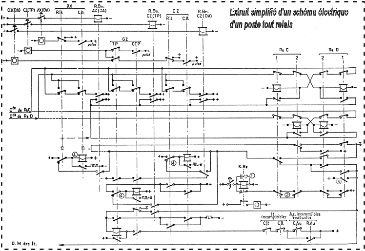 (Railway) Extrait simplifié de schéma électrique PRS